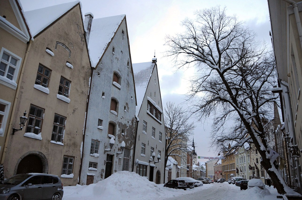 Lai street in Tallinn